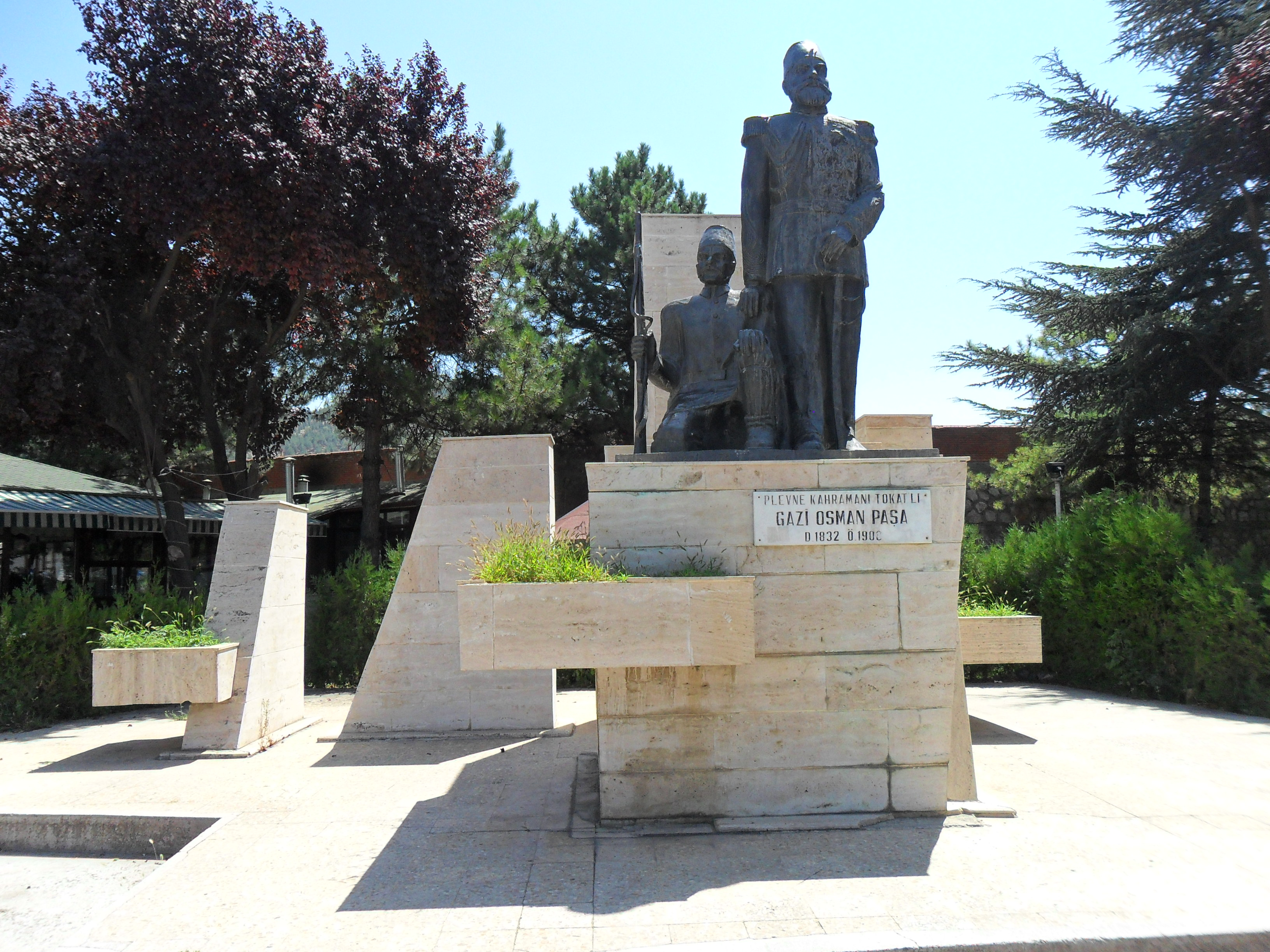 Tokat merkezde yer alan Gazi Osman Paşa Heykeli.